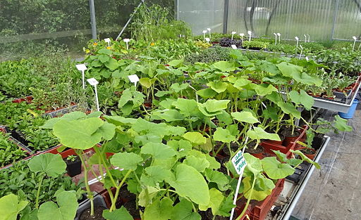 photo de plantes légumières